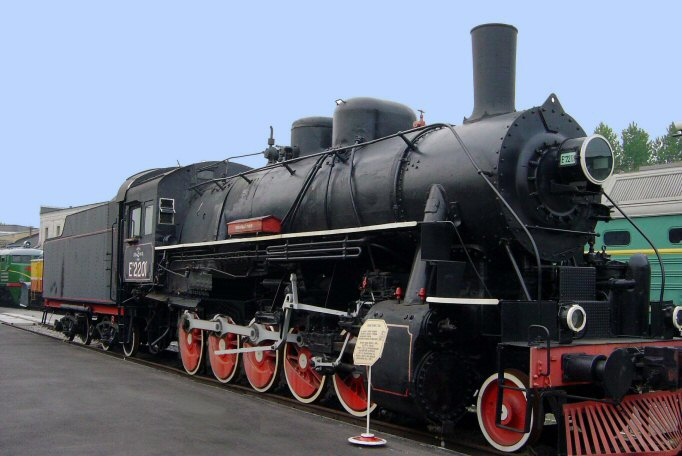 Spoorwegmuseum (vm. Warschaustation) te St. Petersburg. Eigen foto Mark Voorendt, augustus 2002 (Deze foto is bewerkt. Er stond iemand voor de locomotief) Categorie:Afbeelding trein